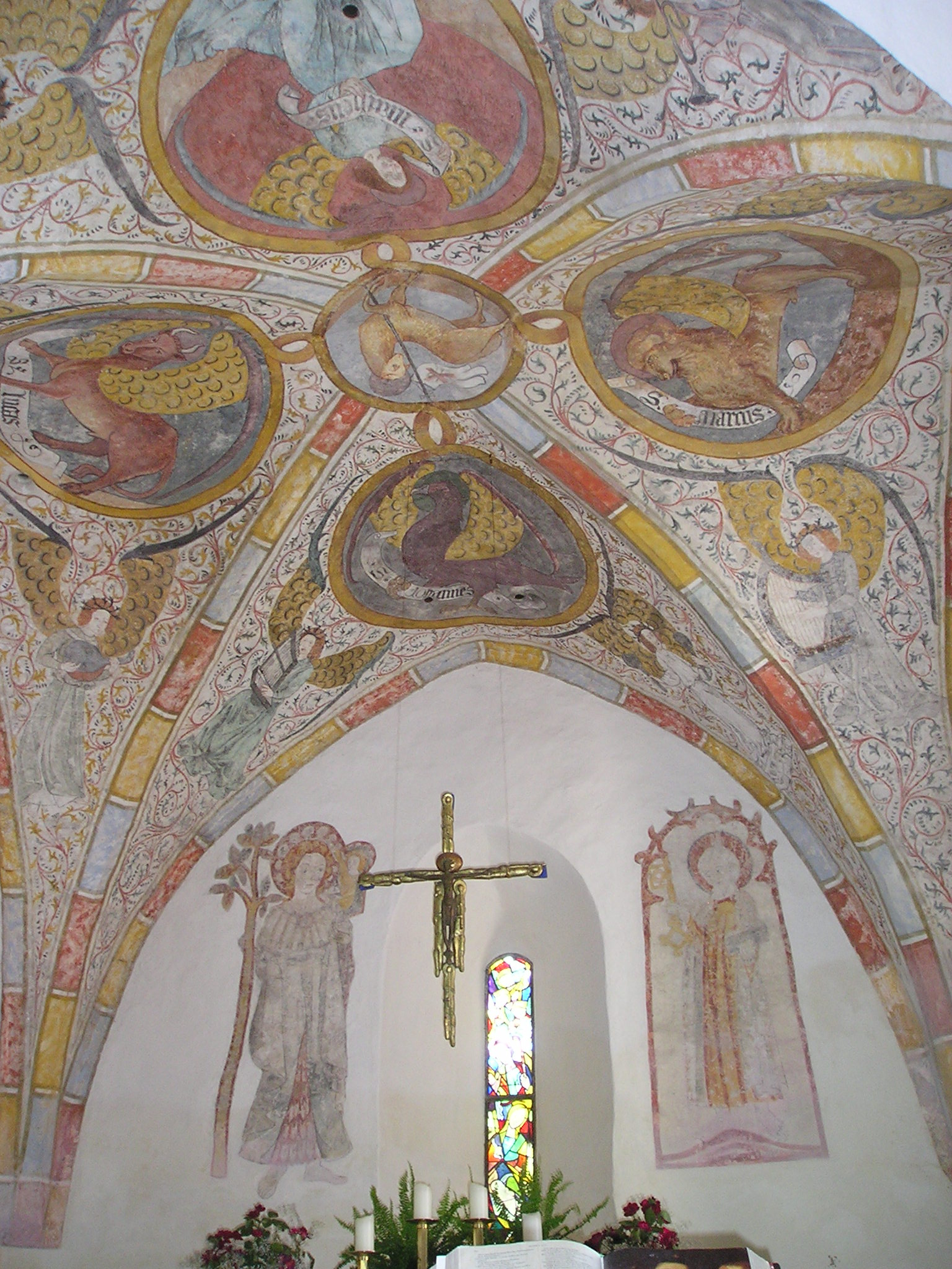 Bühl i. Ries, Gemeindeteil von Alerheim im Landkreis Donau-Ries (Bayern), Evang. St.-Marien-Kirche, Chorfresken